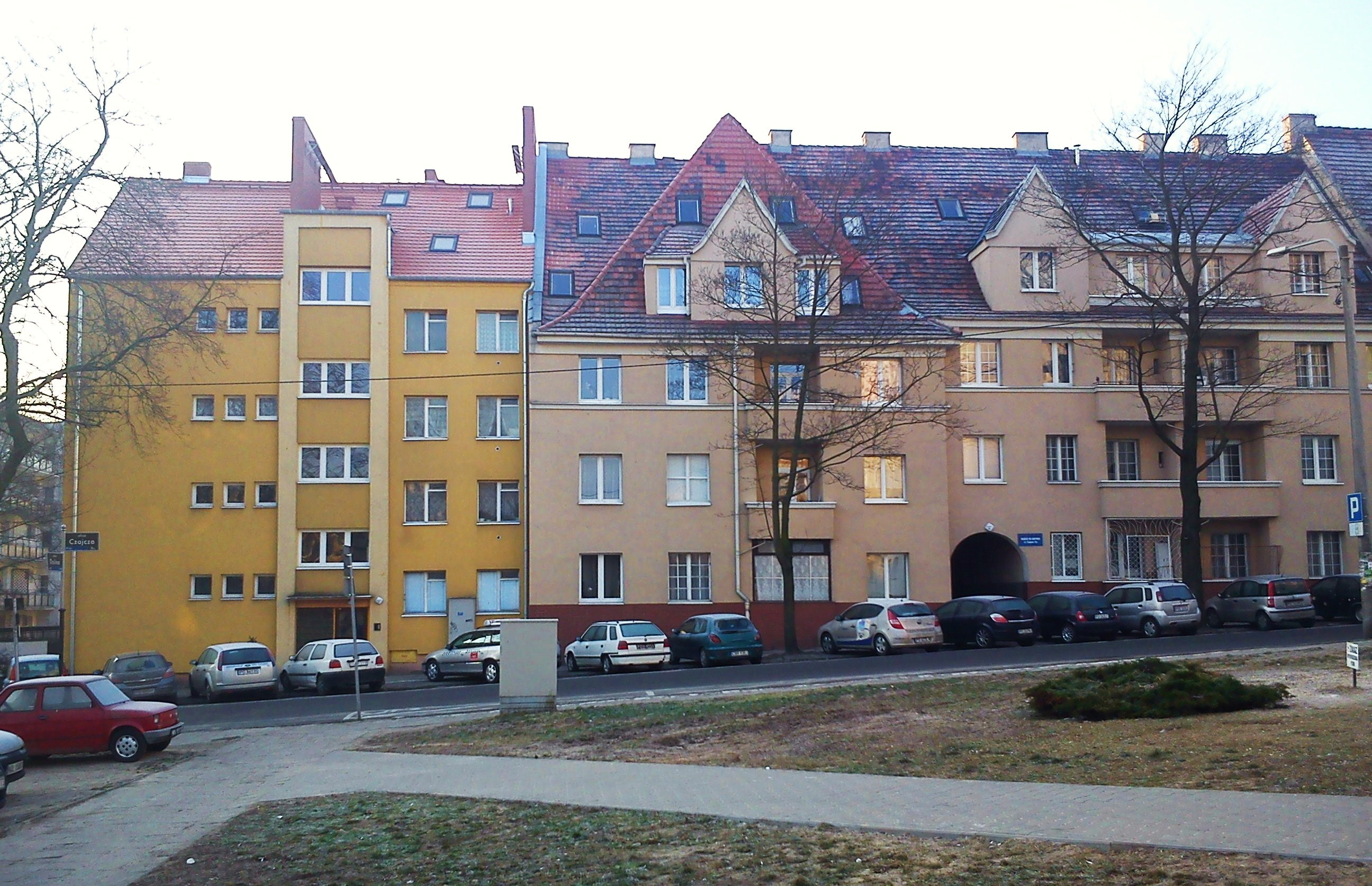 POznań, ul. Czajcza.